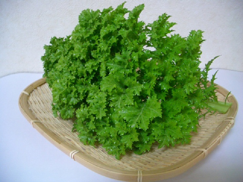 ２００９年２月 尾道因島 外浦干拓内 さいとう農園にて種から３週間のアブラナ科シマフリル®である